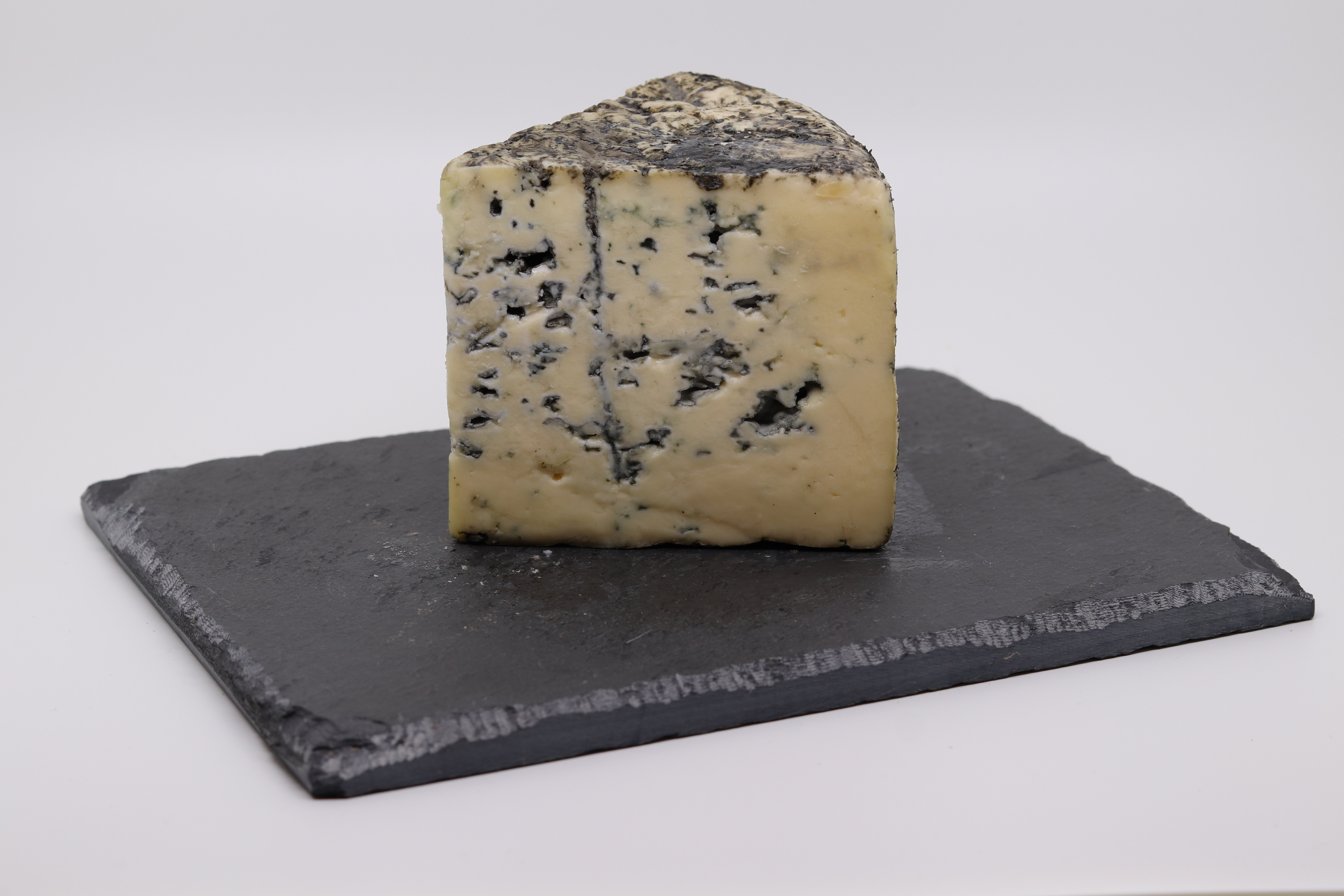 Second atelier Wikifromage. L'atelier a eu lieu à l'édifice de BAnQ Vieux-Montréal.